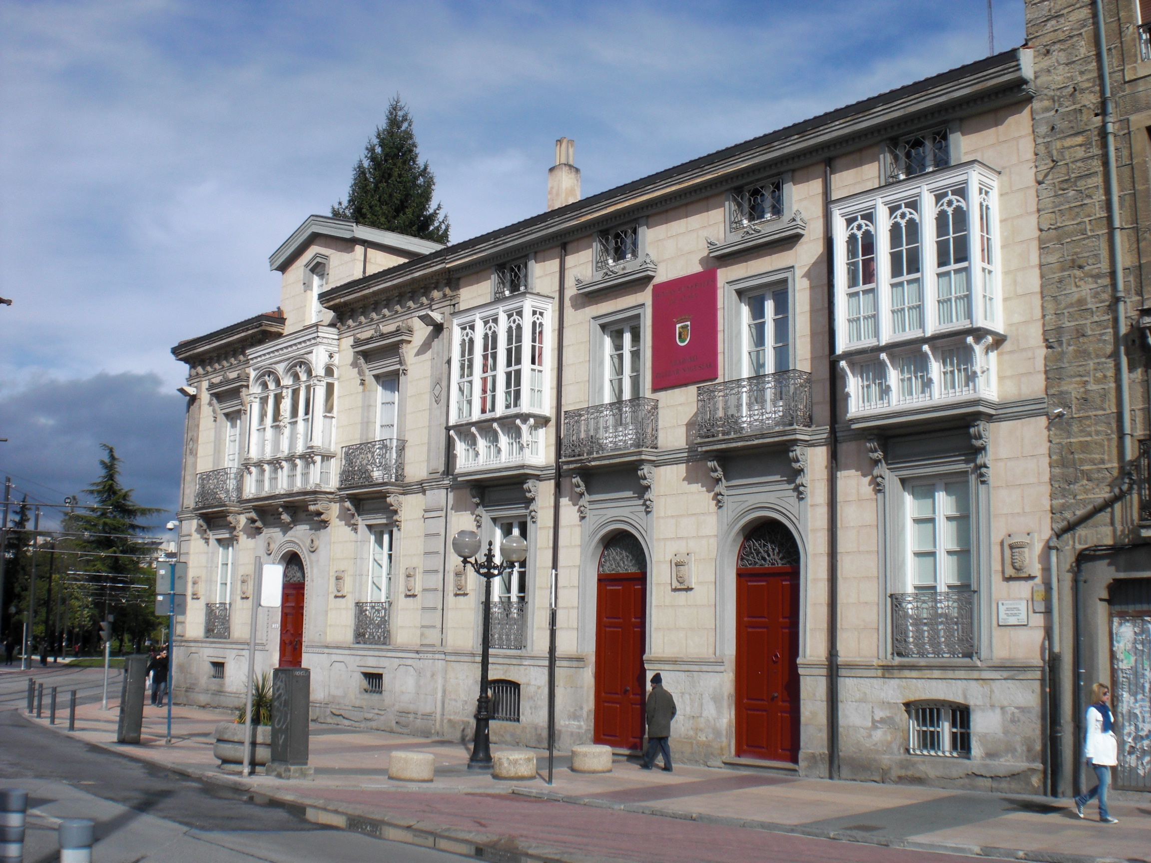 Arabako Batzar Nagusien egoitza